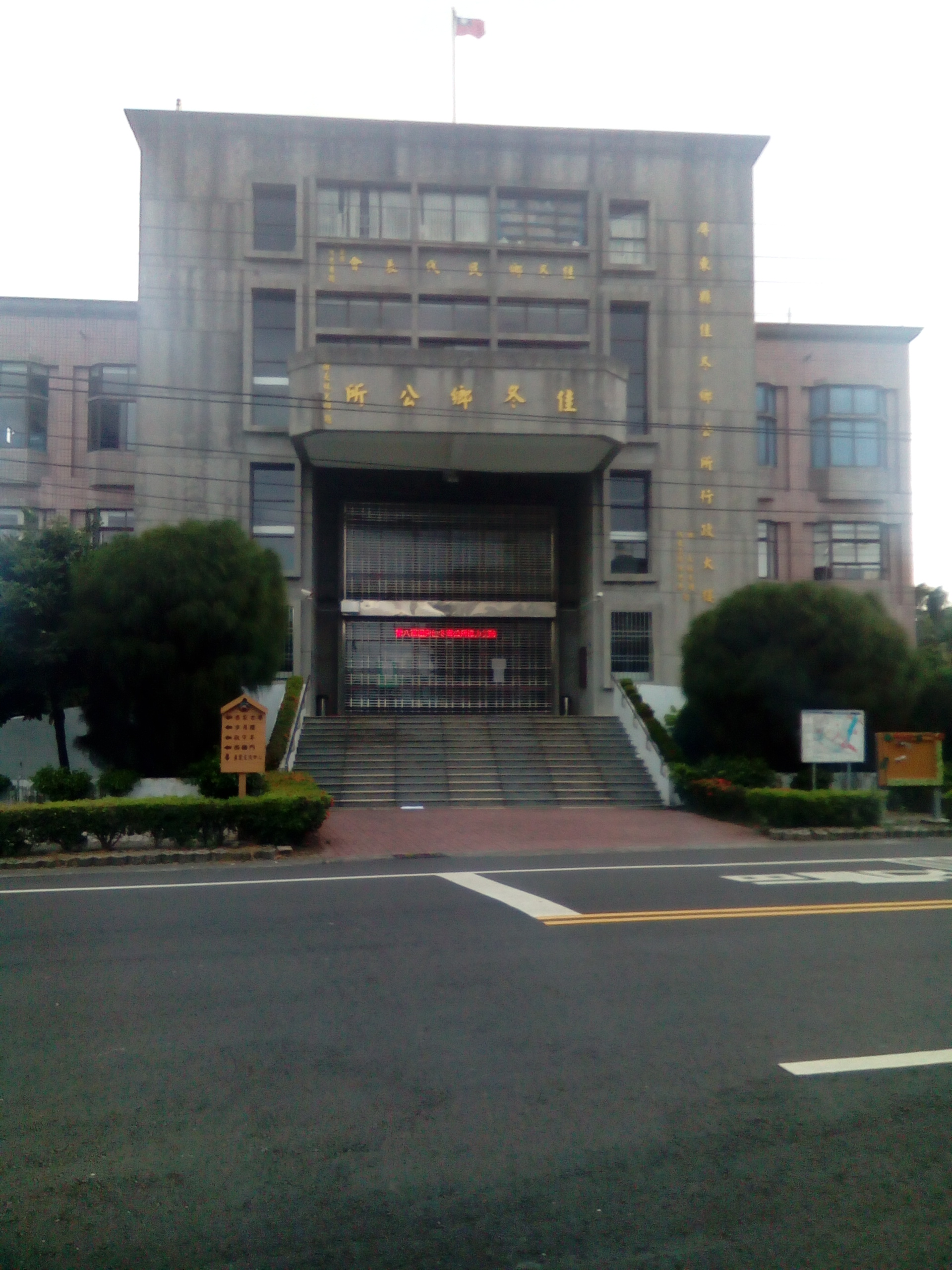 位於加昌路2號 近市區